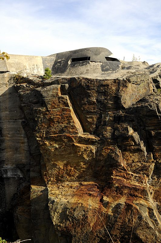 Søndre kommandostandplass på Høytorp fort